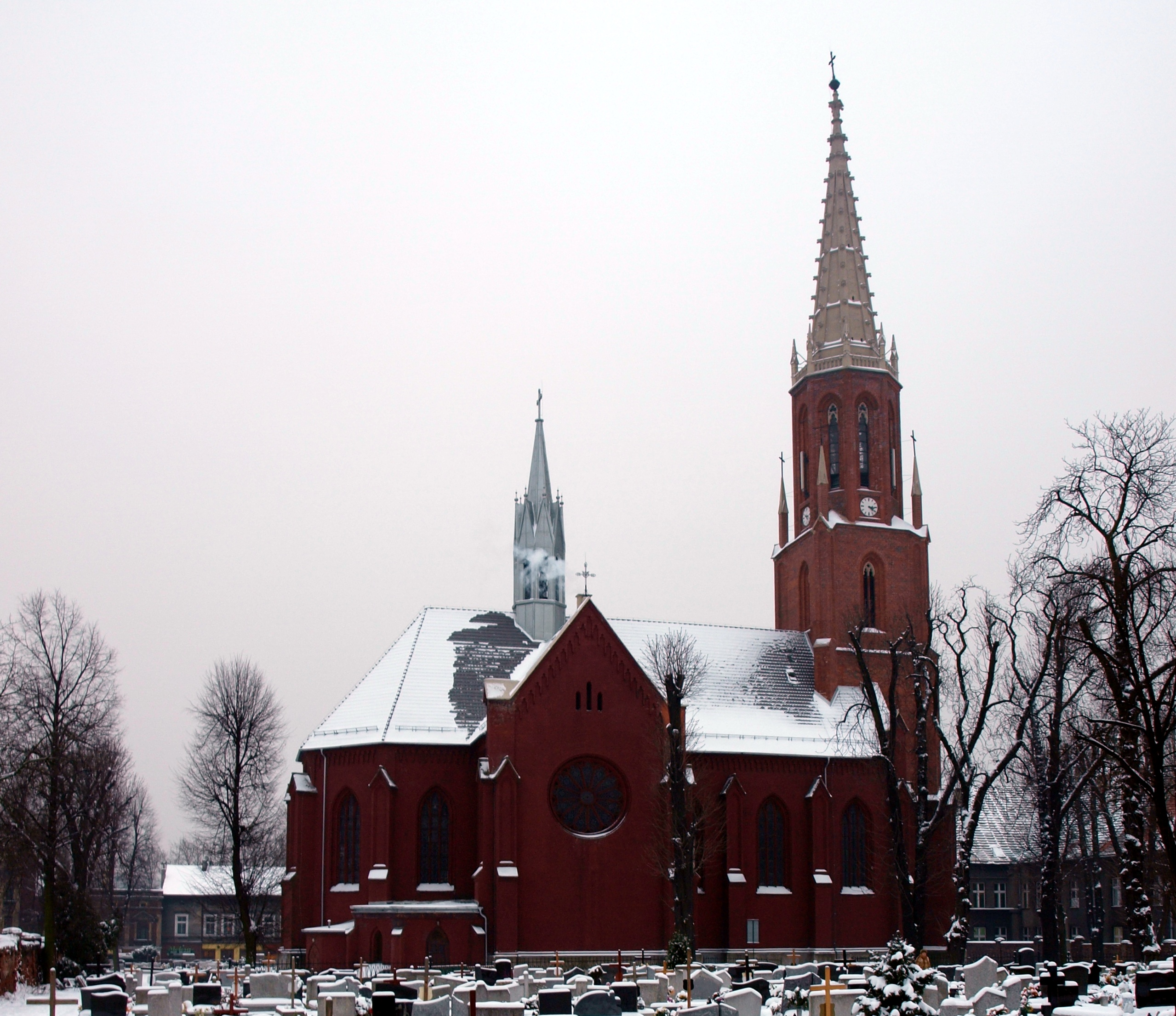 Kościół św. Jana Chrzciciela w Zabrzu-Biskupicach.